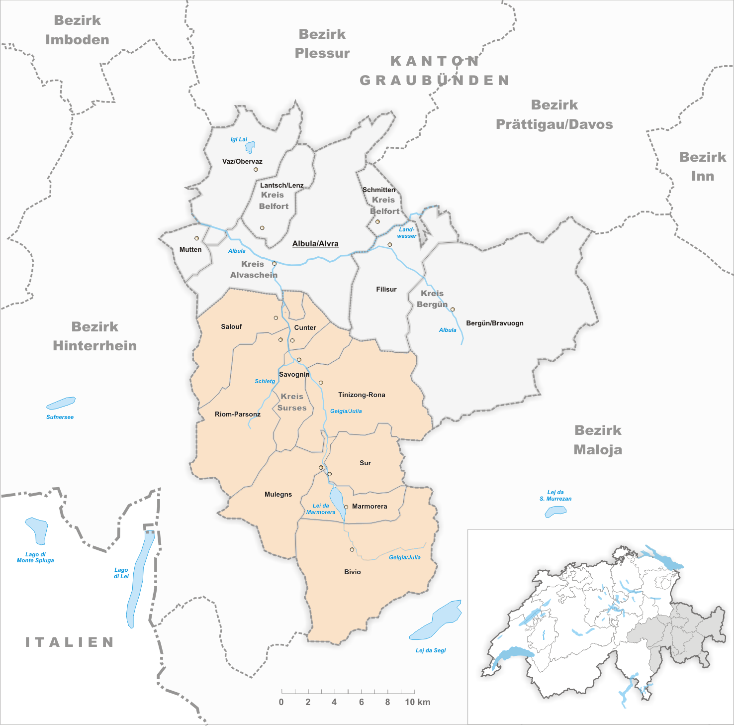 Gemeindegrenzen vor der Fusion zur Gemeinde Surses Rumantsch: Cunfegns digls cumegns avant la fusiun tigl cumegn Surses